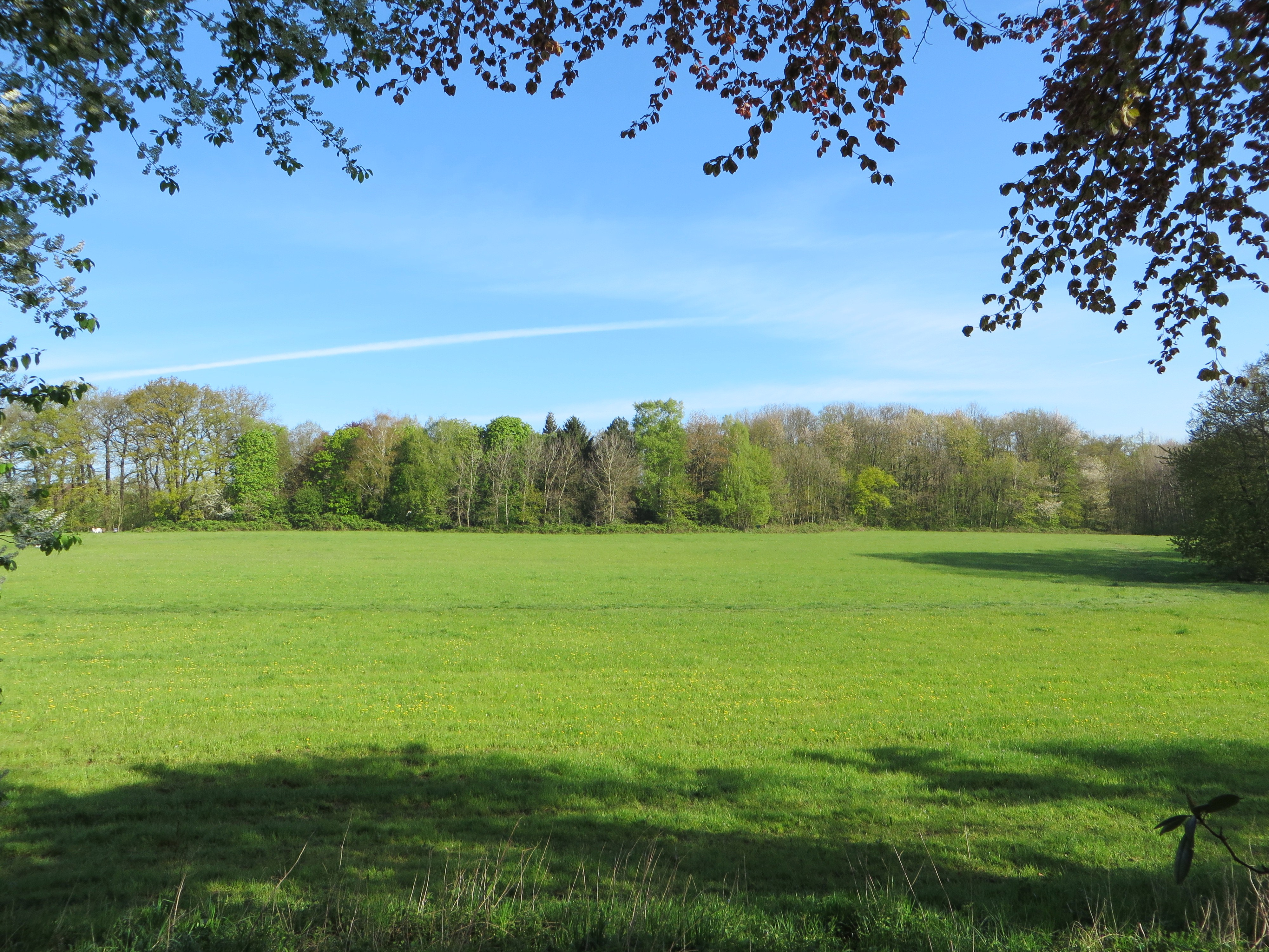 Landschaftsschutzgebiet „Duenningsbruch“ in Hagen, zwischen Feithstraße, Haferkamp, A 46 und Berchumer Straße. Es handelt sich um bewaldete und um z.T. landwirtschaftlich genutze Flächen. Innerhalb des Gebietes befindet sich zwischen Berchumer Straße und „Im Dünningsbruch“ der geschützte Landschaftsbestandteil „Dünningsbruch“, in dem sich ein artenreicher Waldbestand (Eichen-Hainbuchenwald) mit Feuchtstellen und einigen Tümpeln befindet.